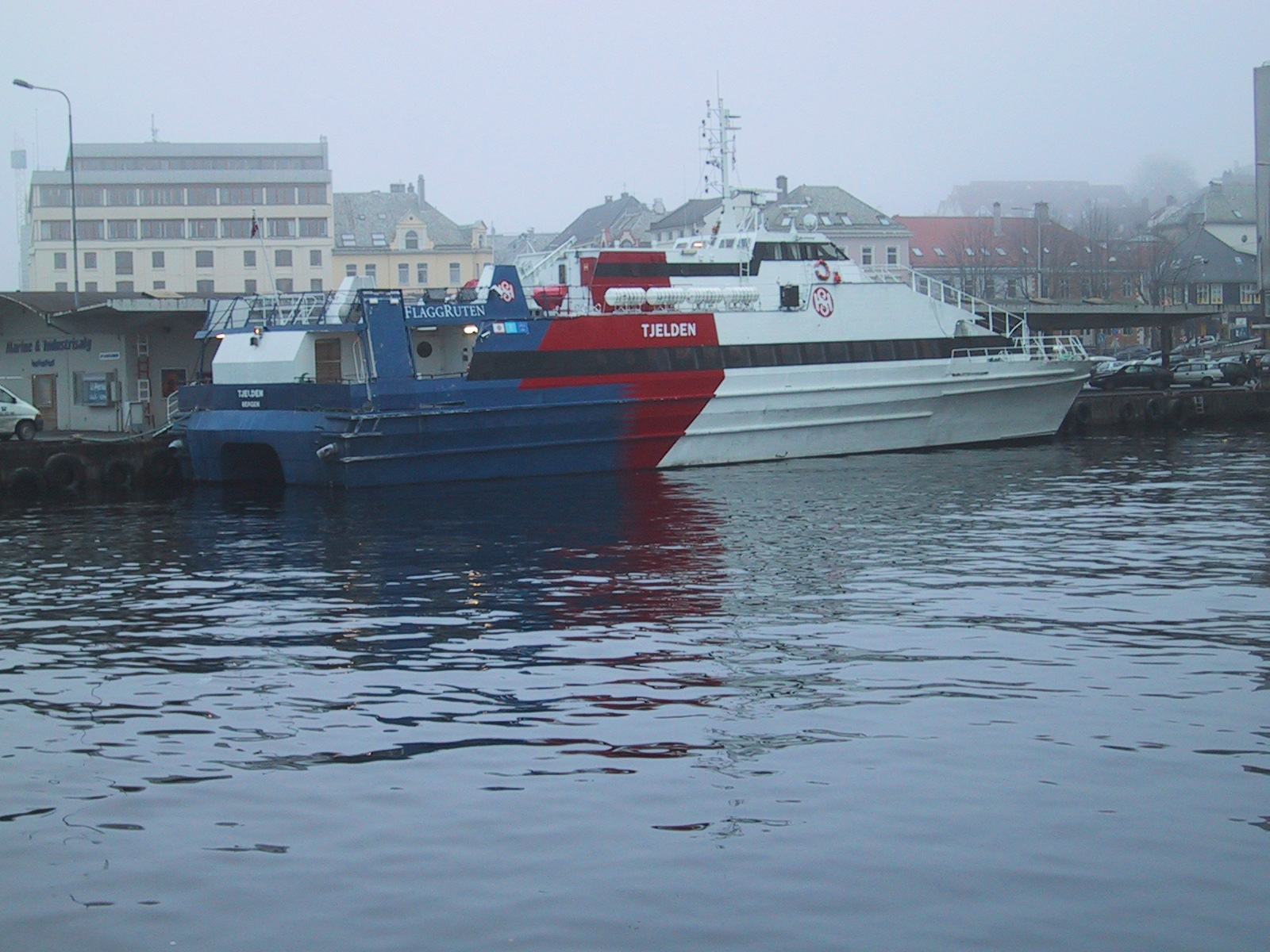 MS Tjelden, built 1986, in Bergen harbour.